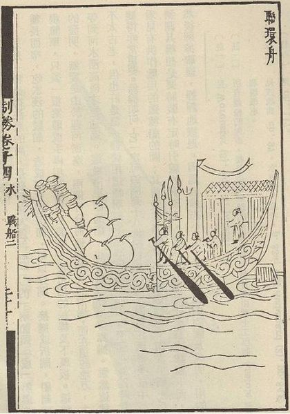 聯環舟的前半舟附有引信，前半舟放置目的地之後，後半舟可分離回港。